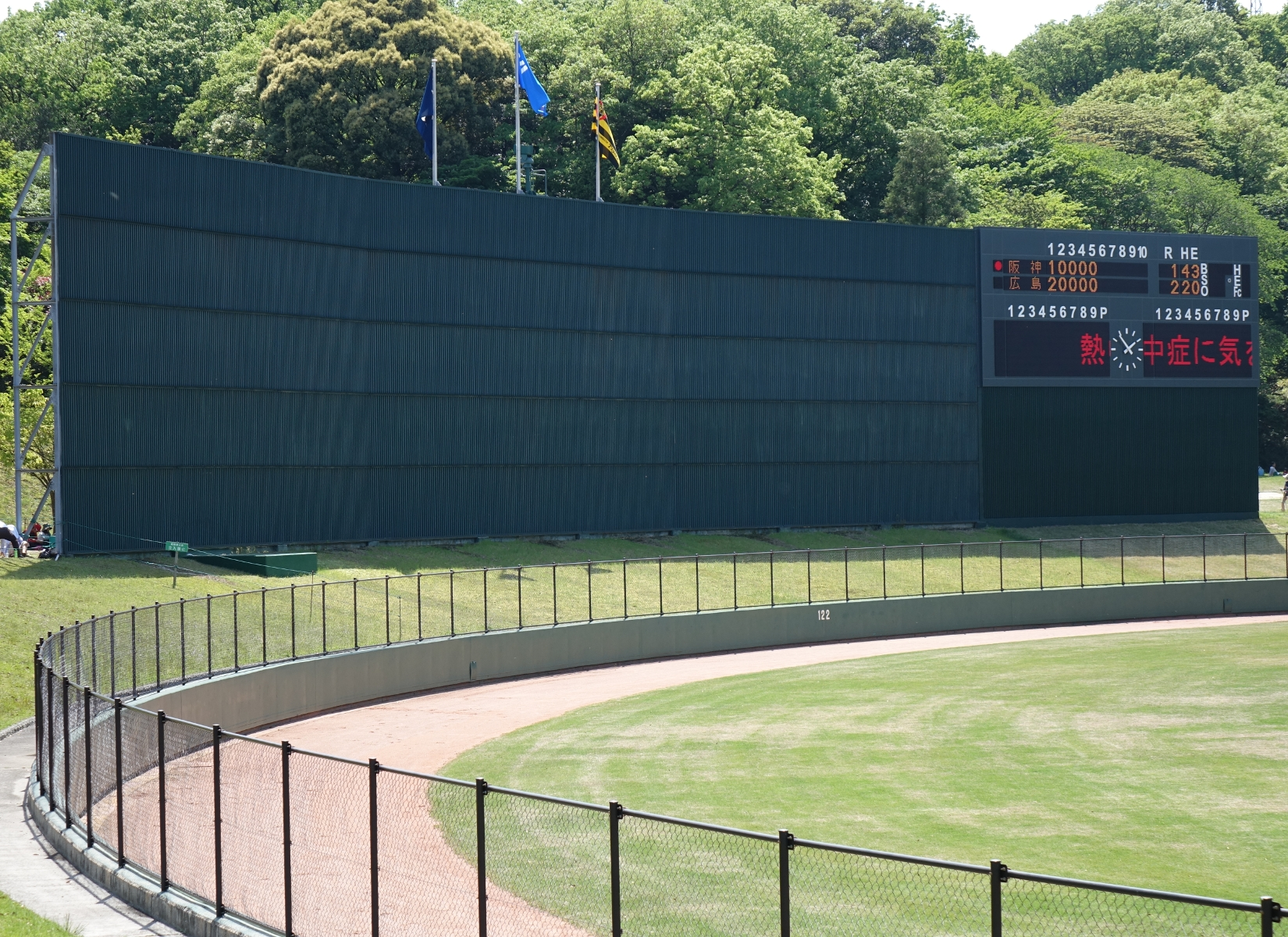 2015年5月2日、改装されたスコアボードを本人撮影